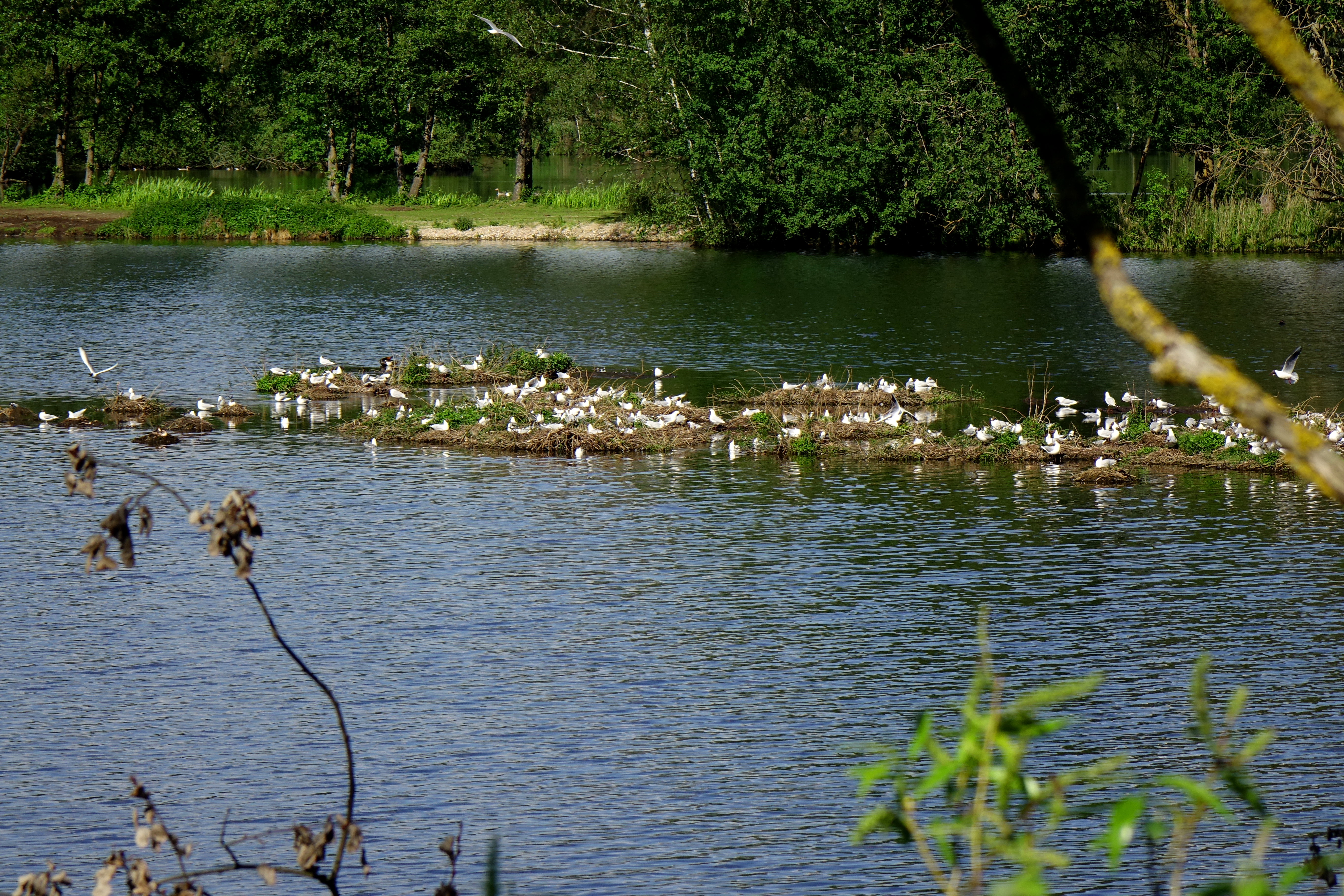 (LSG:BY-LSG-00119.01)_Katzdorfer Weihergruppe Kranzlohweiher